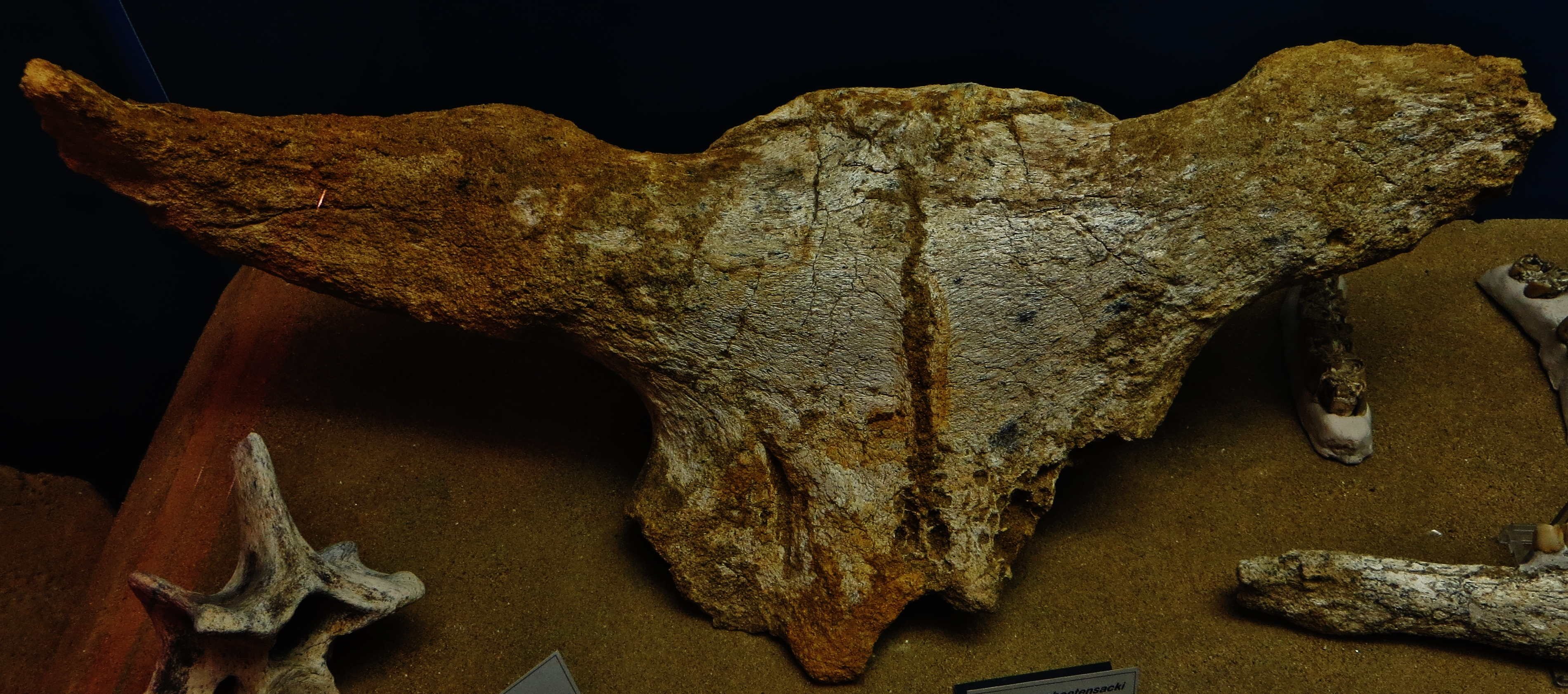 Fossil - took the picture at Museo Scienze Naturali di Faenza